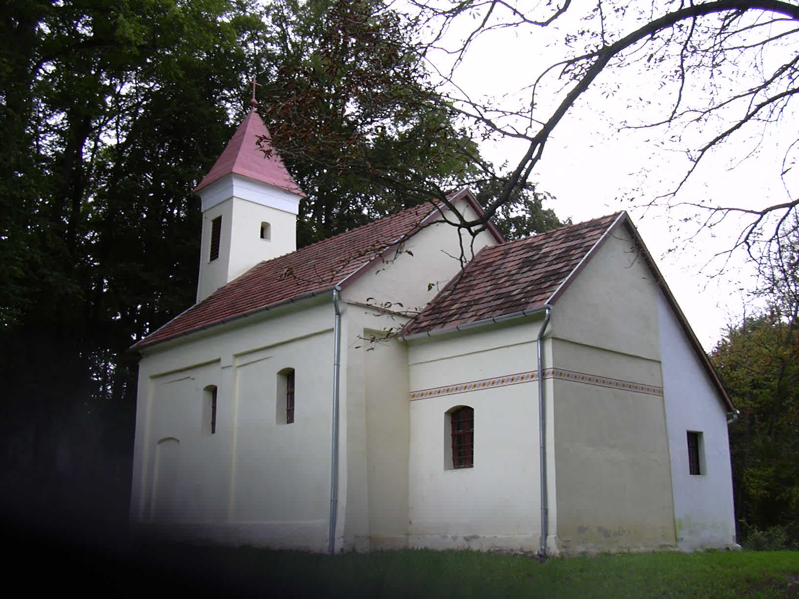 Pusztacsatár (Vaspör), Nagyboldogasszony-kegykápolna